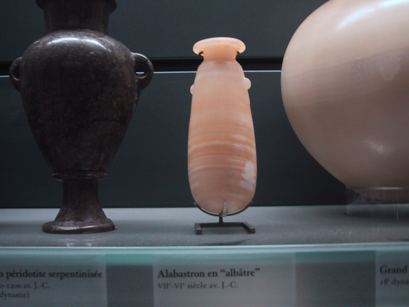 Alabastron en albâtre, VIIe - VIe siècle avant J.-C.